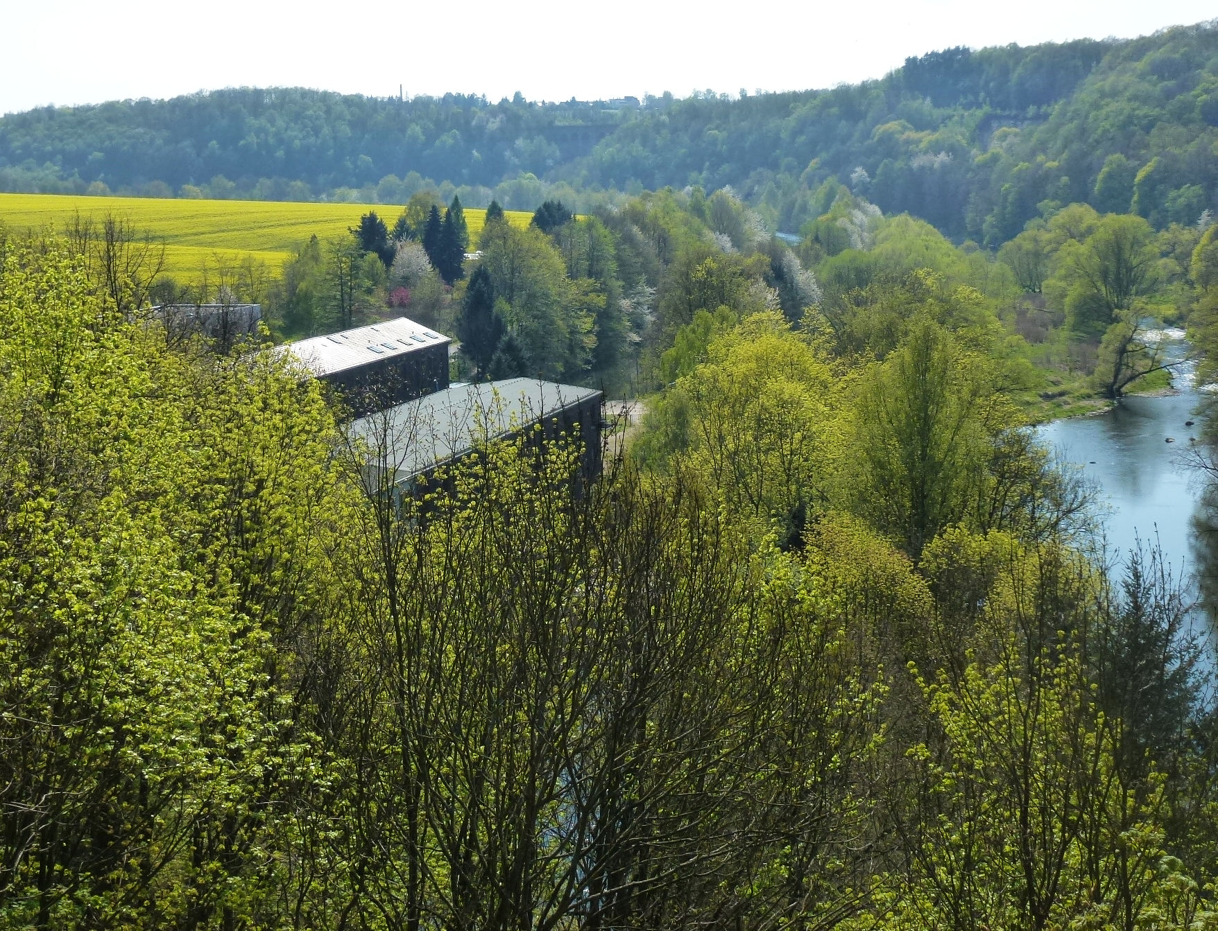 Kurt-Schwabe-Institut in Meinsberg, Blick von der Nixkluft